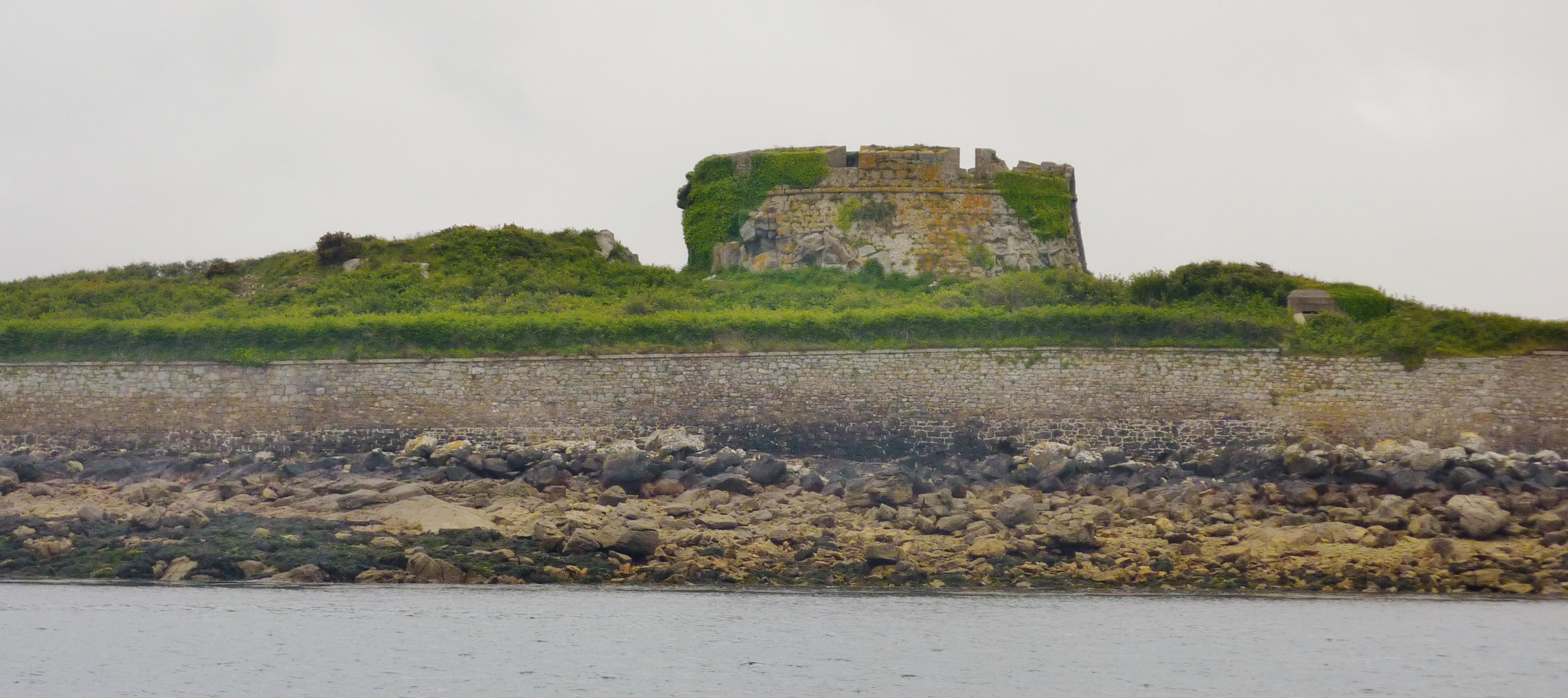 Landéda : le fort de l'Île Cézon vu de l'entrée de l'Aber Wrac'h